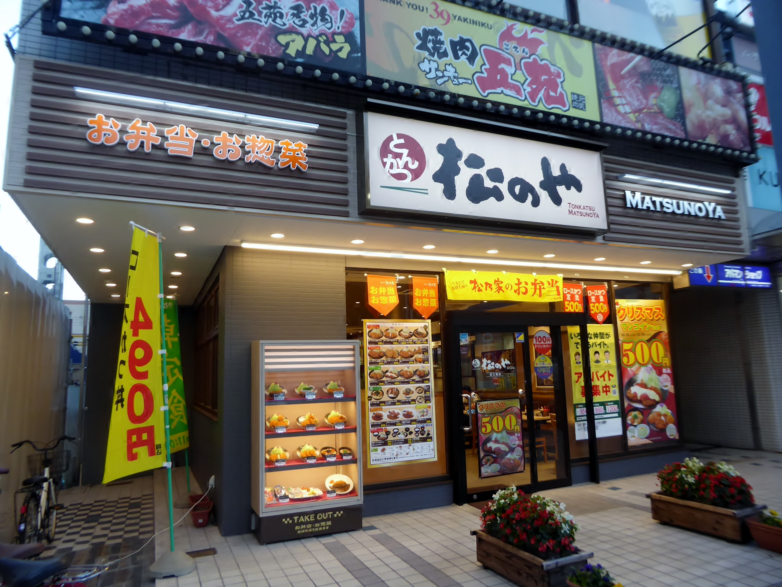 松のや深江橋店を撮影。元々はサンクス深江橋店だった。